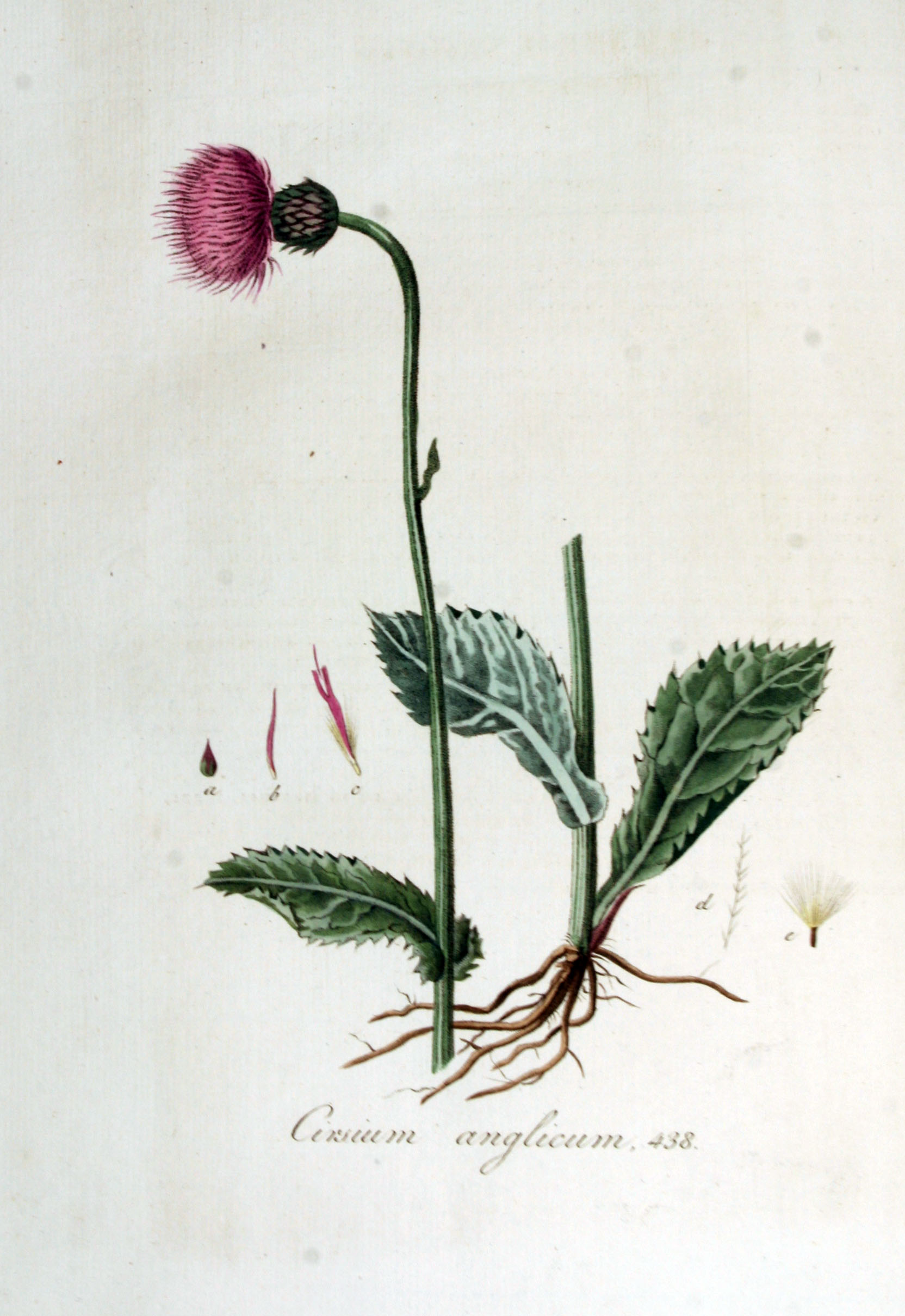 Cirsium dissectum (L.) Hill (Syn. Cirsium anglicum (Lam.) DC.)